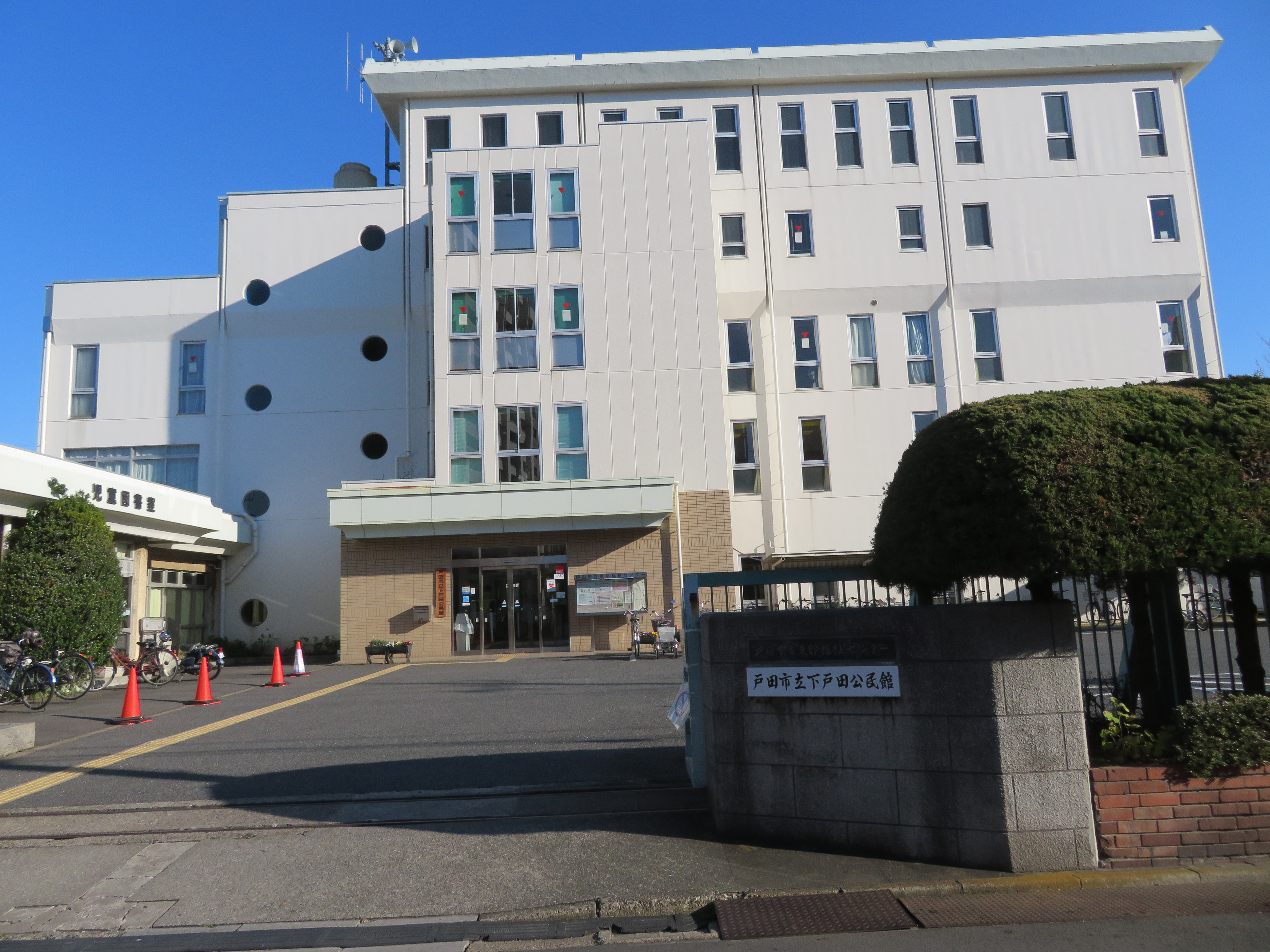 戸田市に所在する戸田市東部福祉センター Canon PowerShot SX720 HS